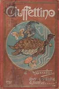 Copertina di Ciuffettino (1908) scritto e illustrato da Yambo.